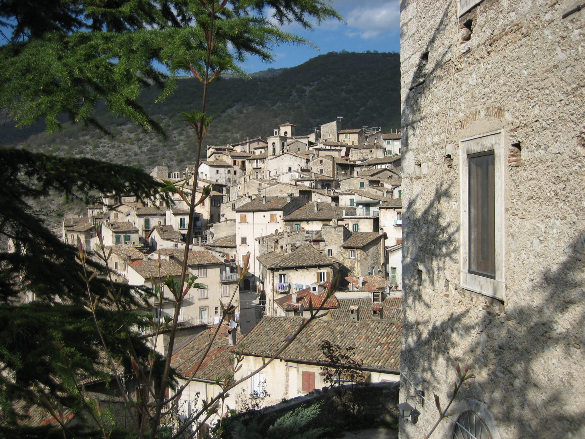 Scanno: scorcio della cittadina di Scanno nel Parco Nazionale d'Abruzzo. Aprile 2006.